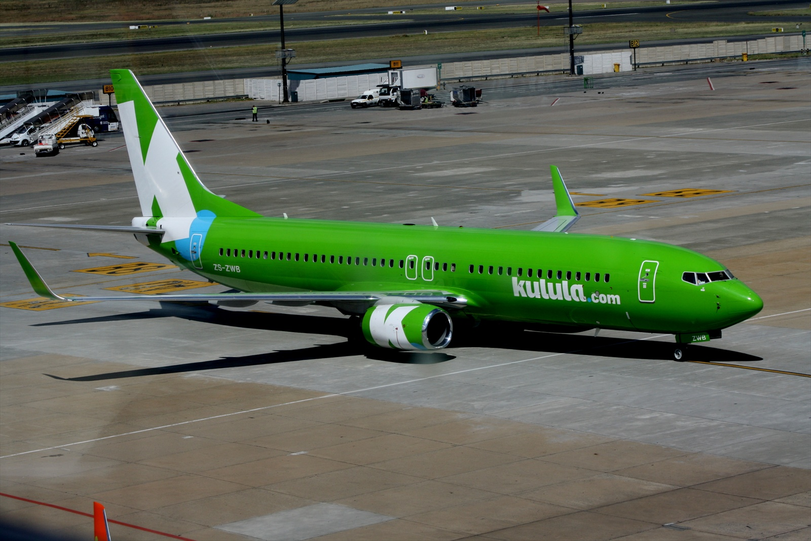 Kulula B737-8LD ZS-ZWB